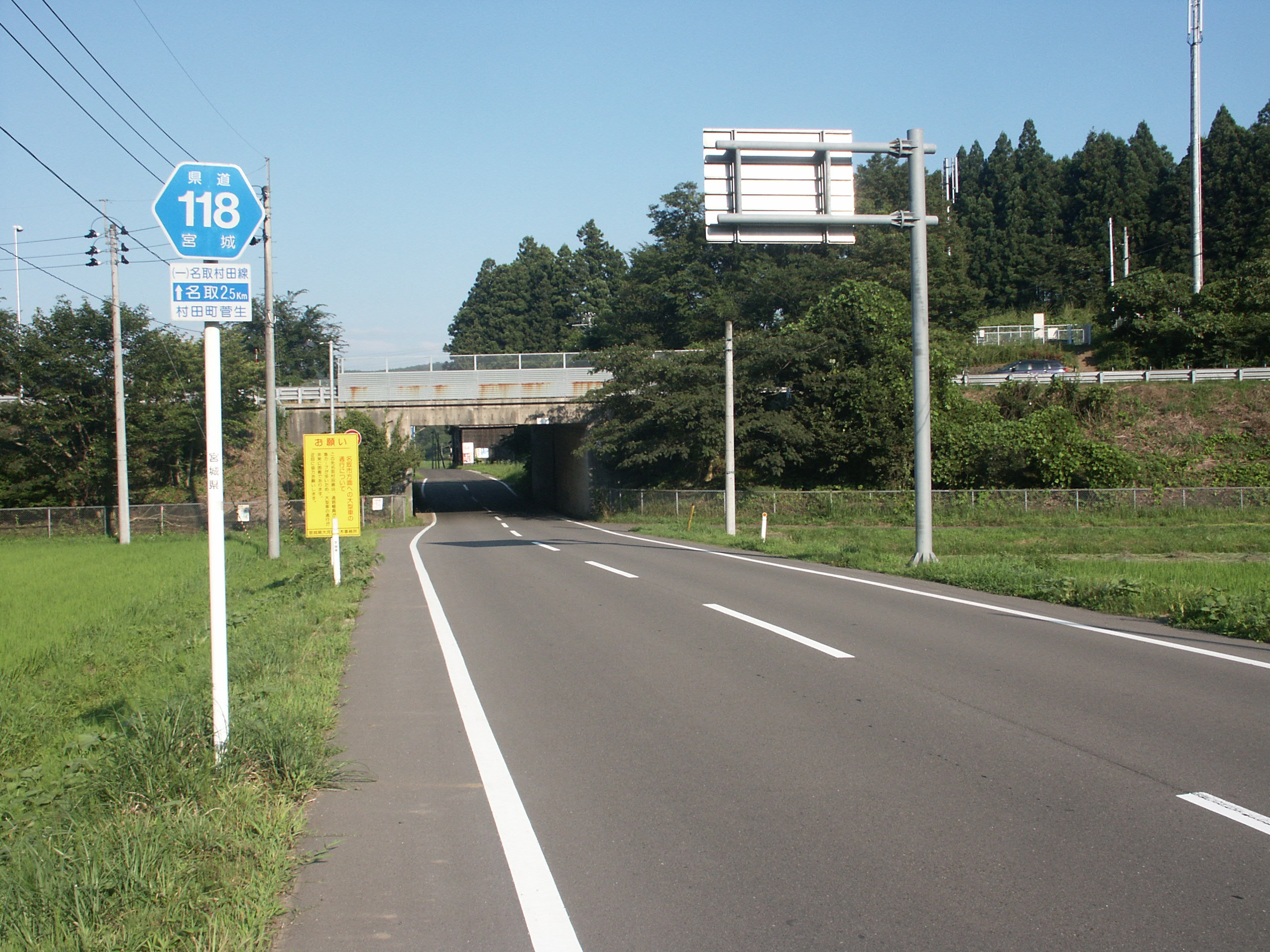 宮城県道118号線村田町菅生付近